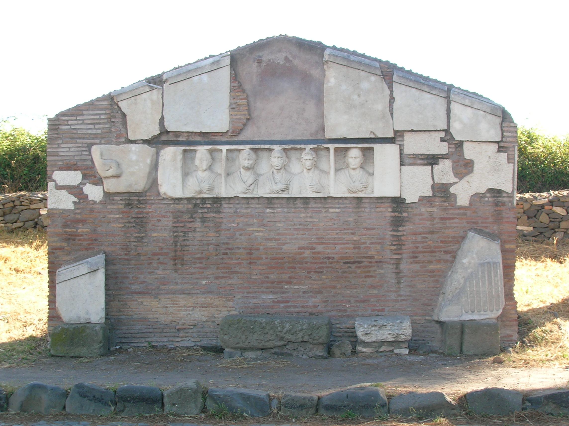 Appia antica, tomba di Ilario Fusco